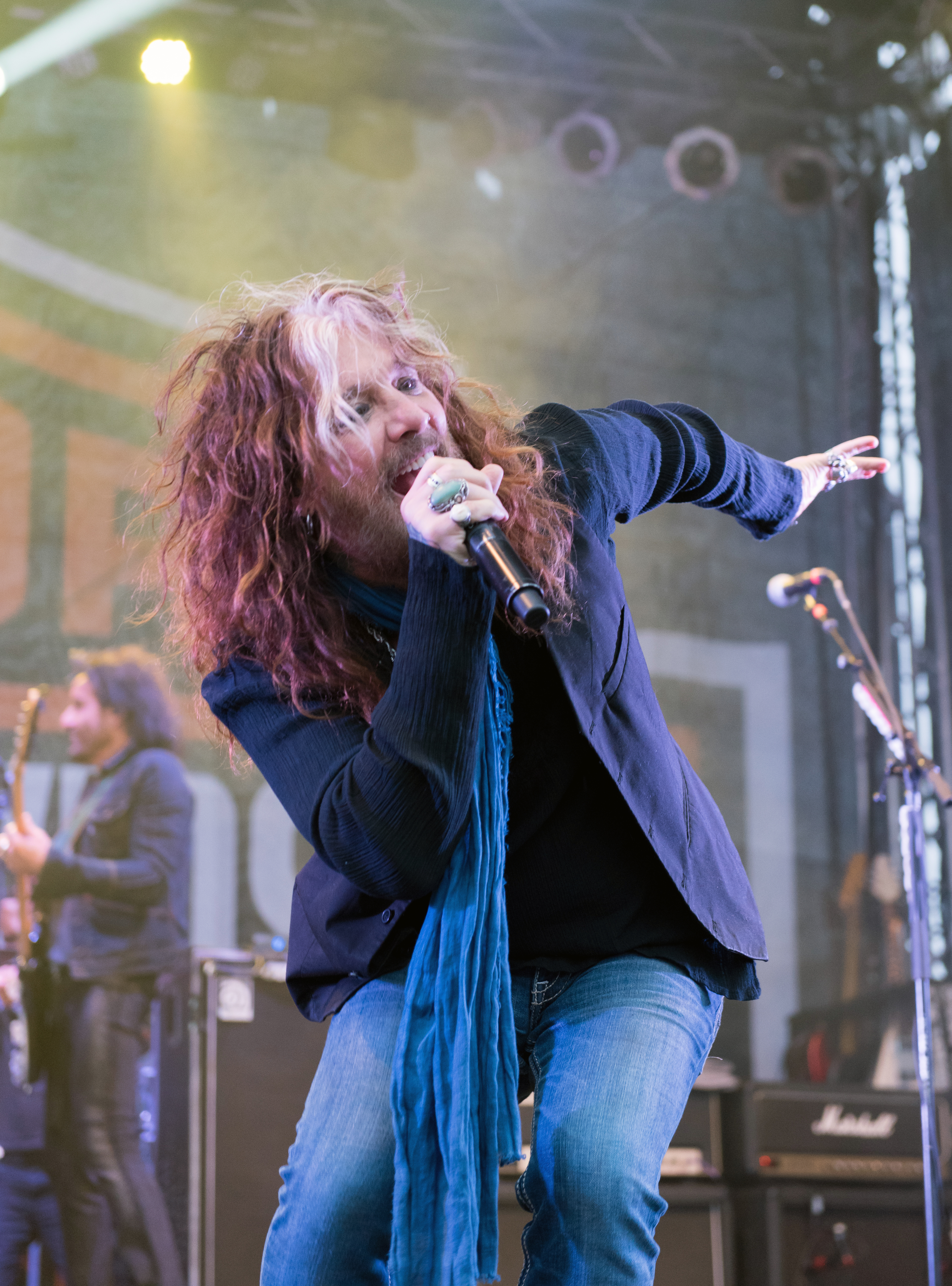 The Dead Daisies bei den Hamburg Harley Days 2017